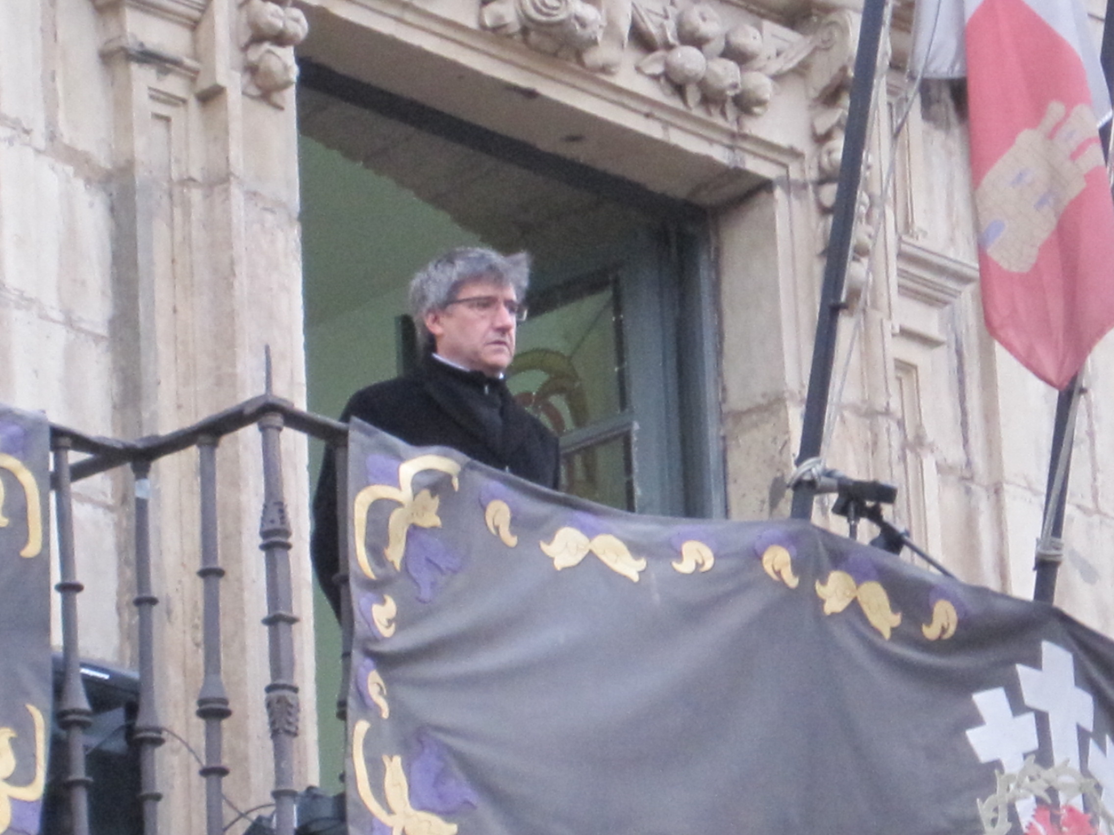 El alcalde de León (España), Francisco Fernández, en el encuentro de la Procesión de los Pasos de 2010.